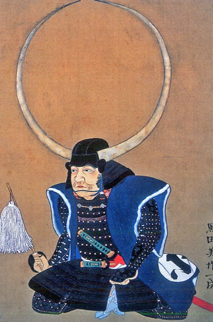 福岡黒田家家臣黒田一成の肖像画。